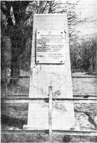 Споменик на Пасуљанским ливадама где је 21.јуна 1941. године Петар Стамболић, инструктор ПК КПЈ за Србију одржао састанак са рударима-комунистима из Равне Реке.